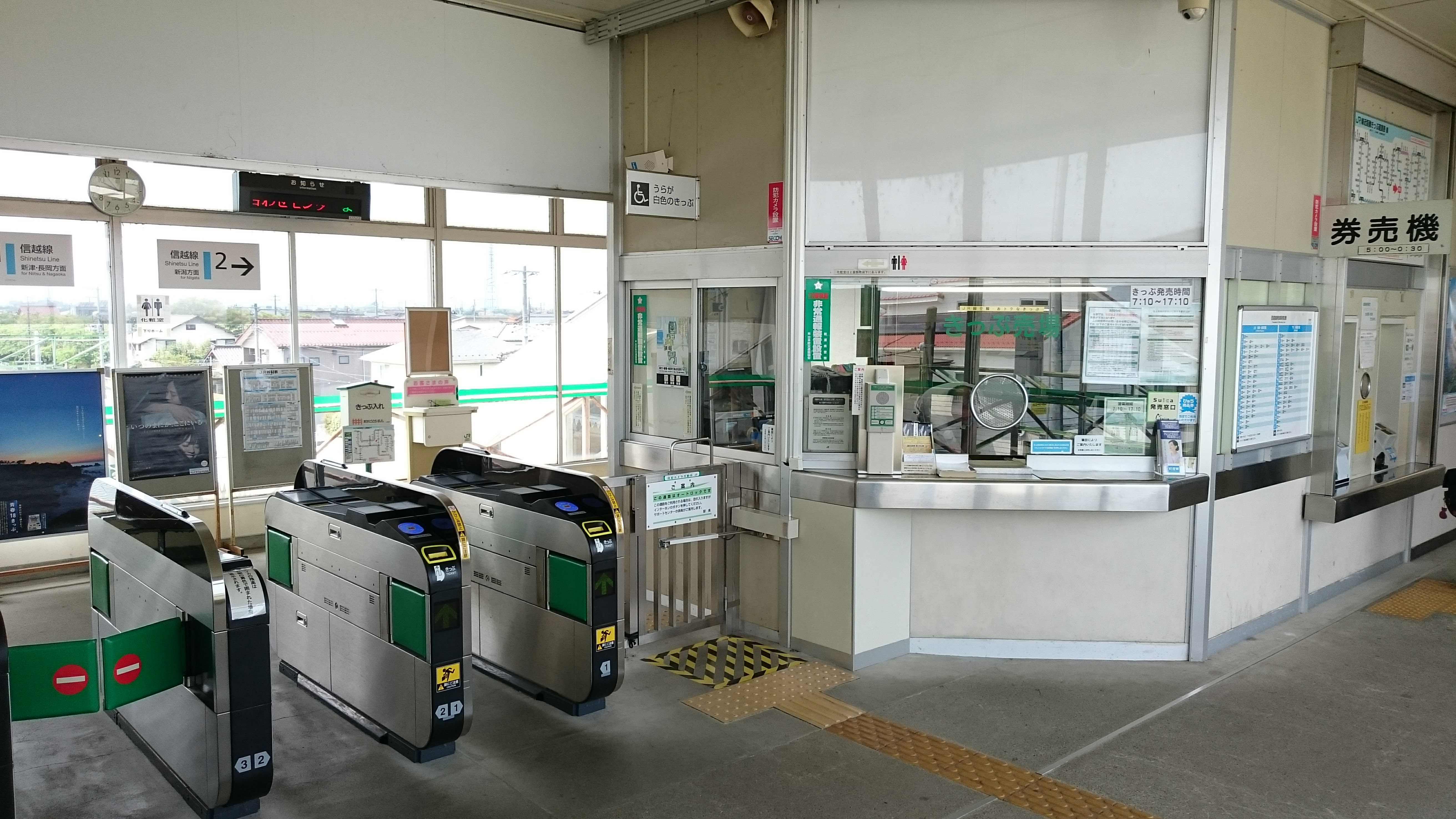 荻川駅のコンコース